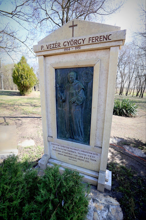 Vezér György Ferenc pálos szerzetes pap sírja Pálosszentkúton